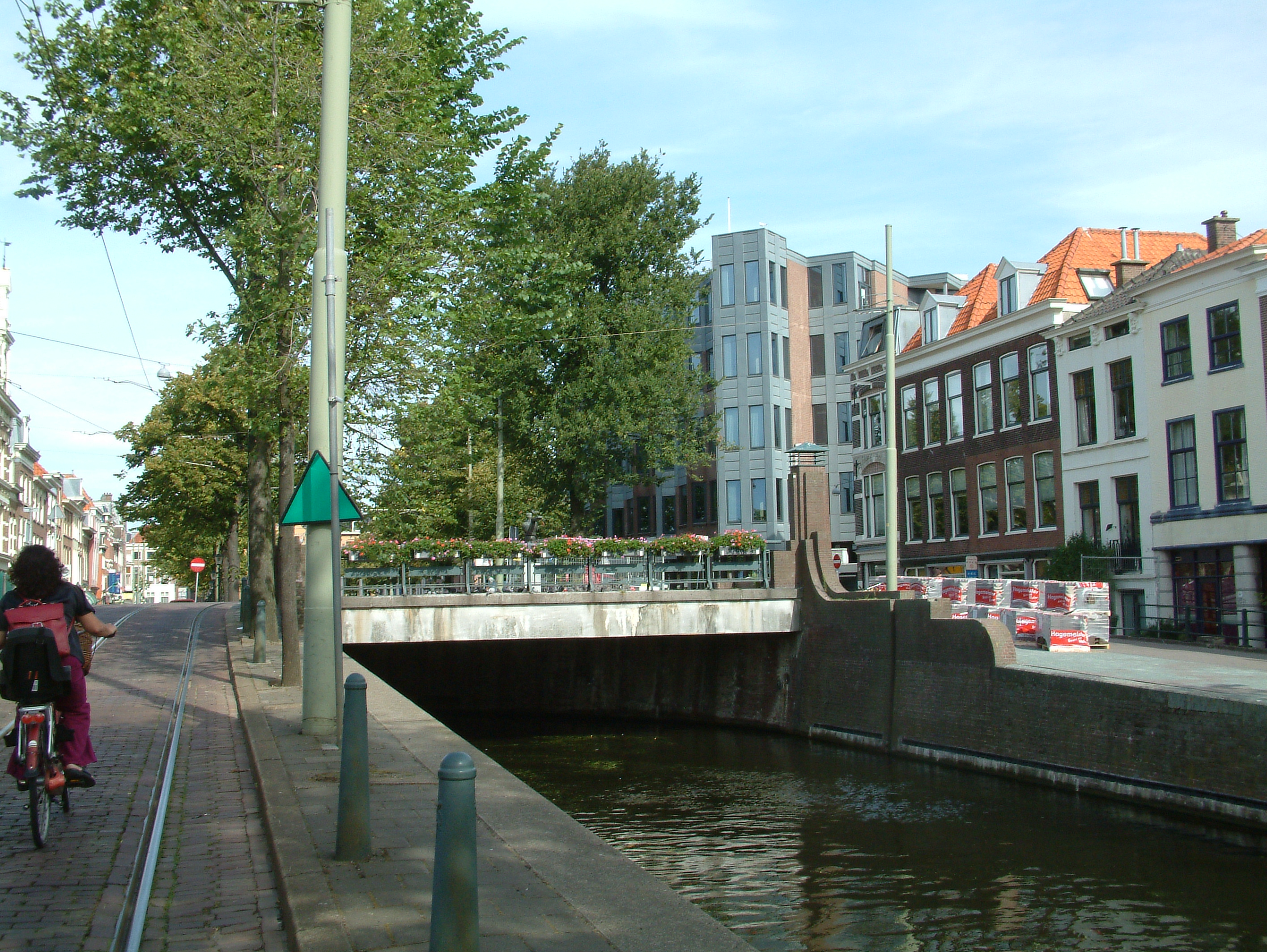 Brug in Den Haag